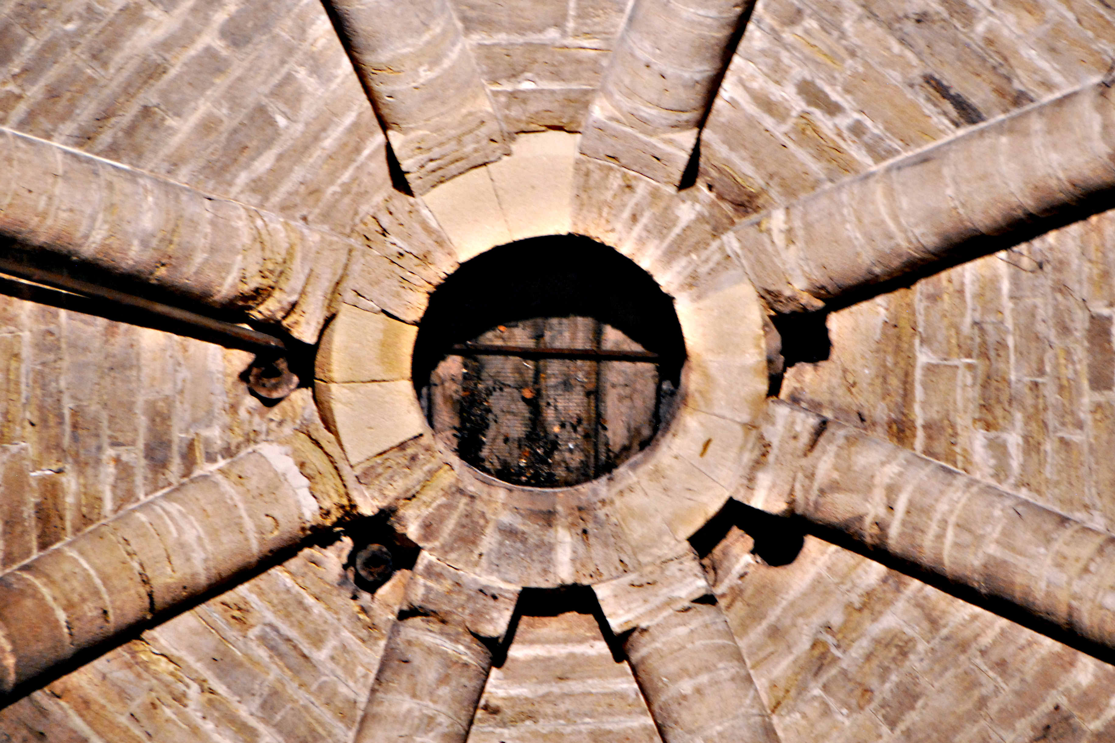 N-D-du-Lac du Le Thor, First Trompenkuppel